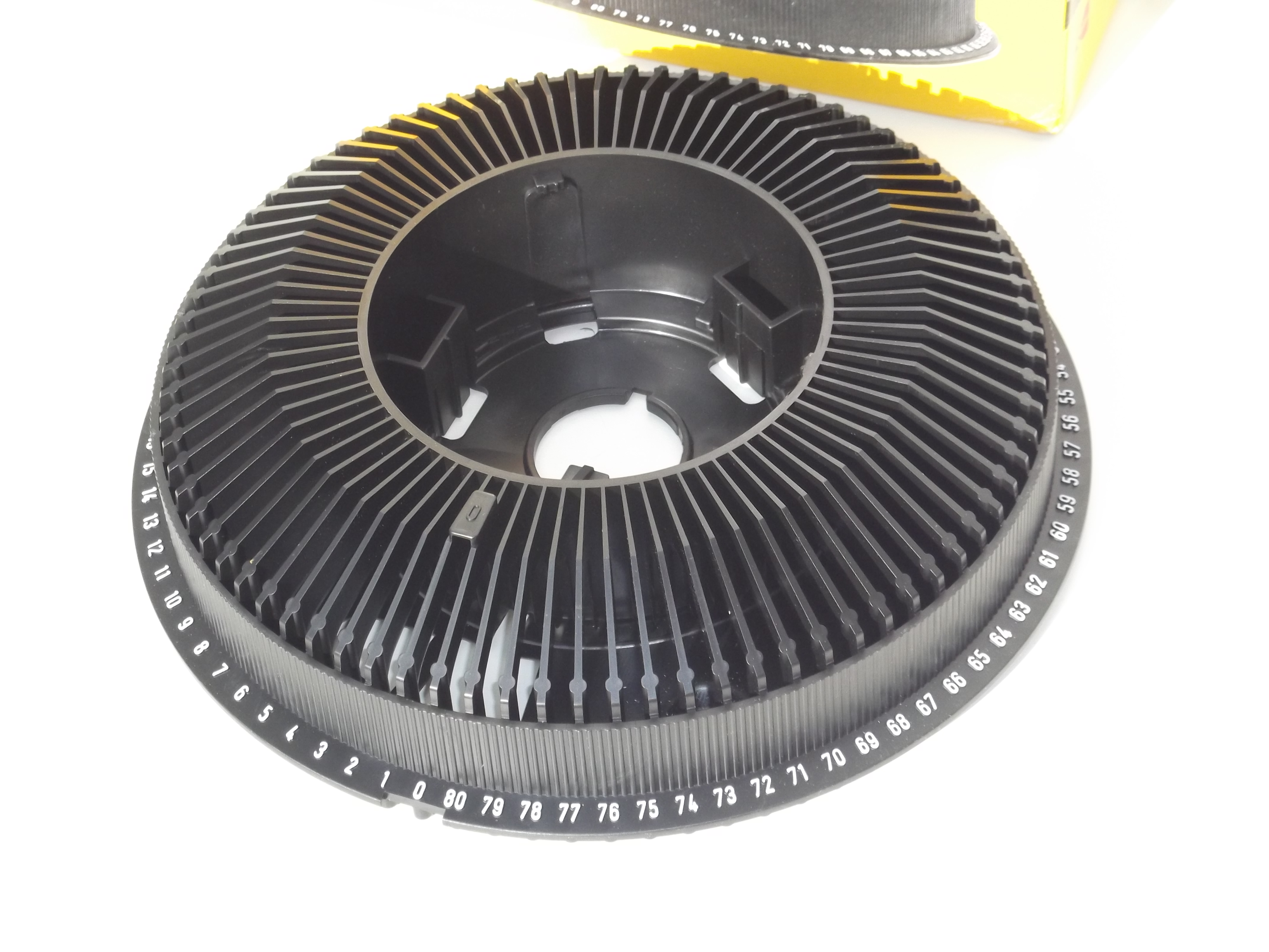 Kodak Rundmagazin für 80 Diarahmen 5 x 5 cm, bis 3,2 mm dick, für Kodak Carousel S-AV 2000